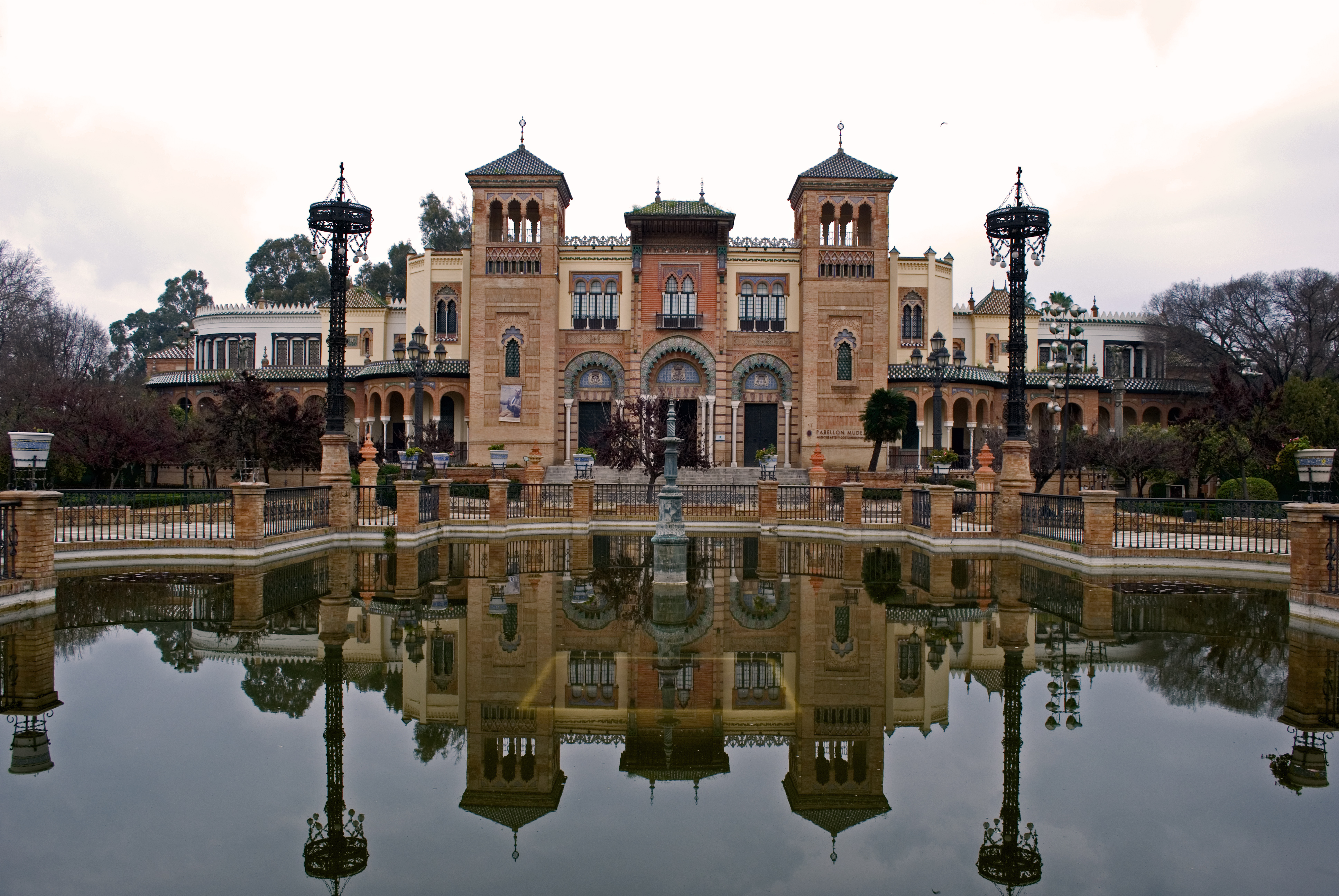 Vista del Pabellón Mudéjar, reflejado en uno de los estanques de la Plaza de América, dentro del Parque María Luisa de Sevilla, arquitecto Aníbal González